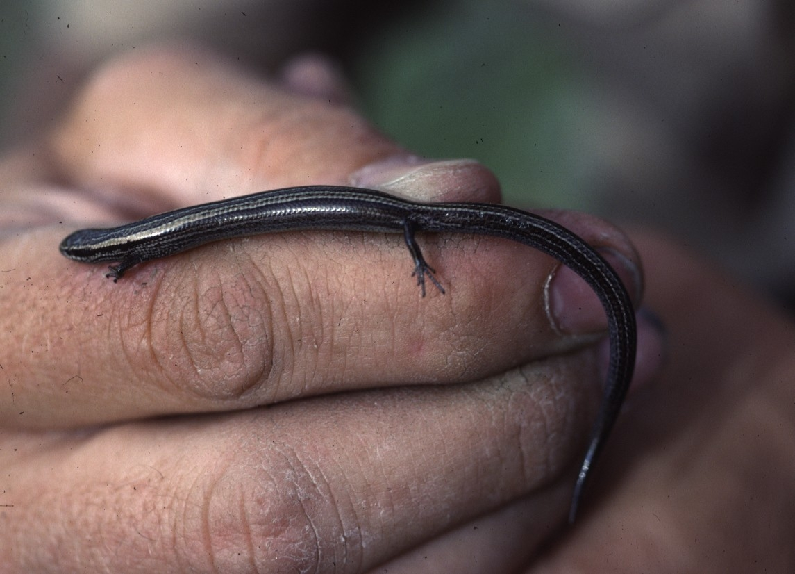 Ablepharus chernovi. Fotograferad i Turkiet, 3 km S. Camlibel, Prov. Tokat. Samlingar av Naturhistoriska museet i Göteborg.